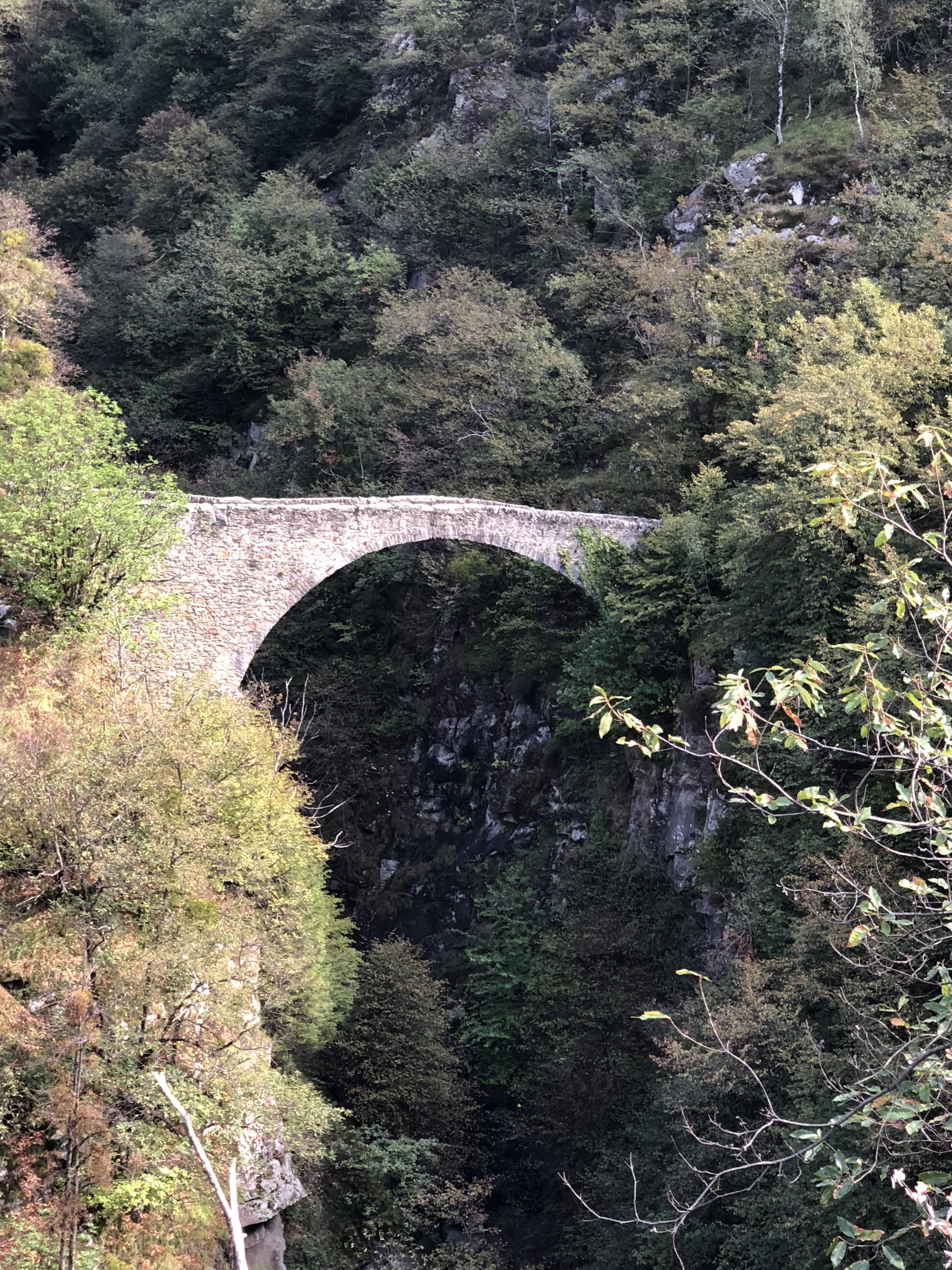 Ponte Laù Ansicht von Westen